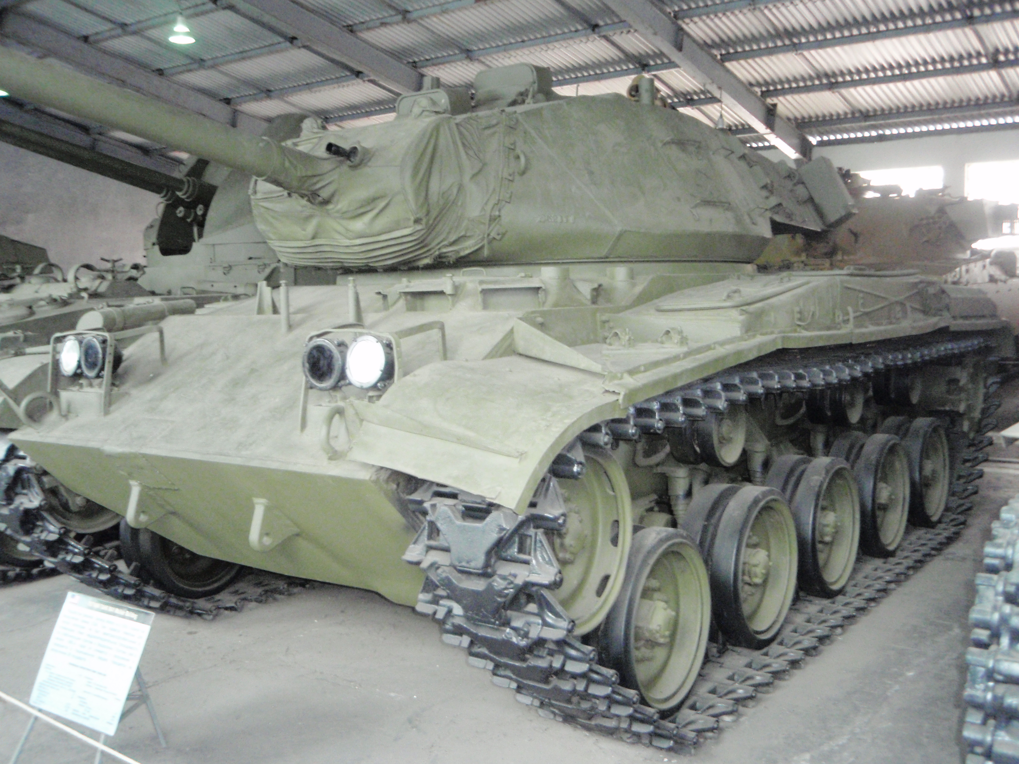 Американский лёгкий танк M41 (Walker Bulldog) в Кубинке